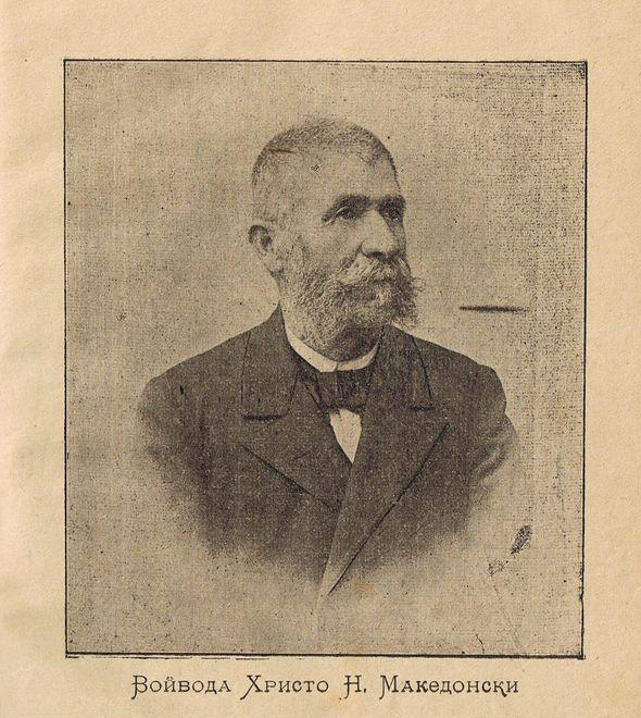 Портрет на Христо Македонски